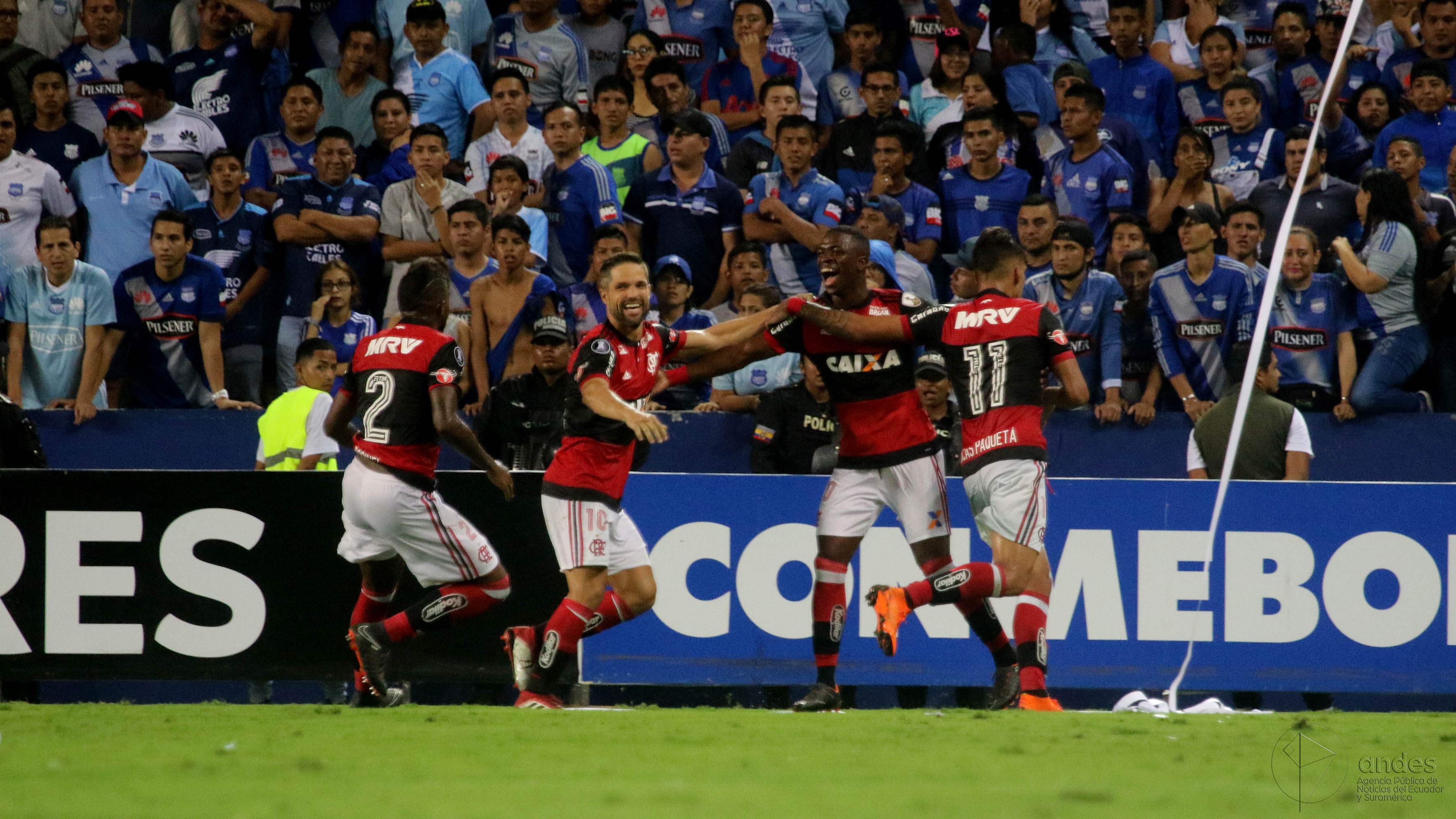 Guayaquil, miércoles 14 de marzo del 2018 (Andes).-En el estadio Capwell en Guayaquil, Emelec enfrenta a Flamengo de Brasil en la segunda fecha del grupo D de la Copa Libertadores. Foto:Andes/César Muñoz